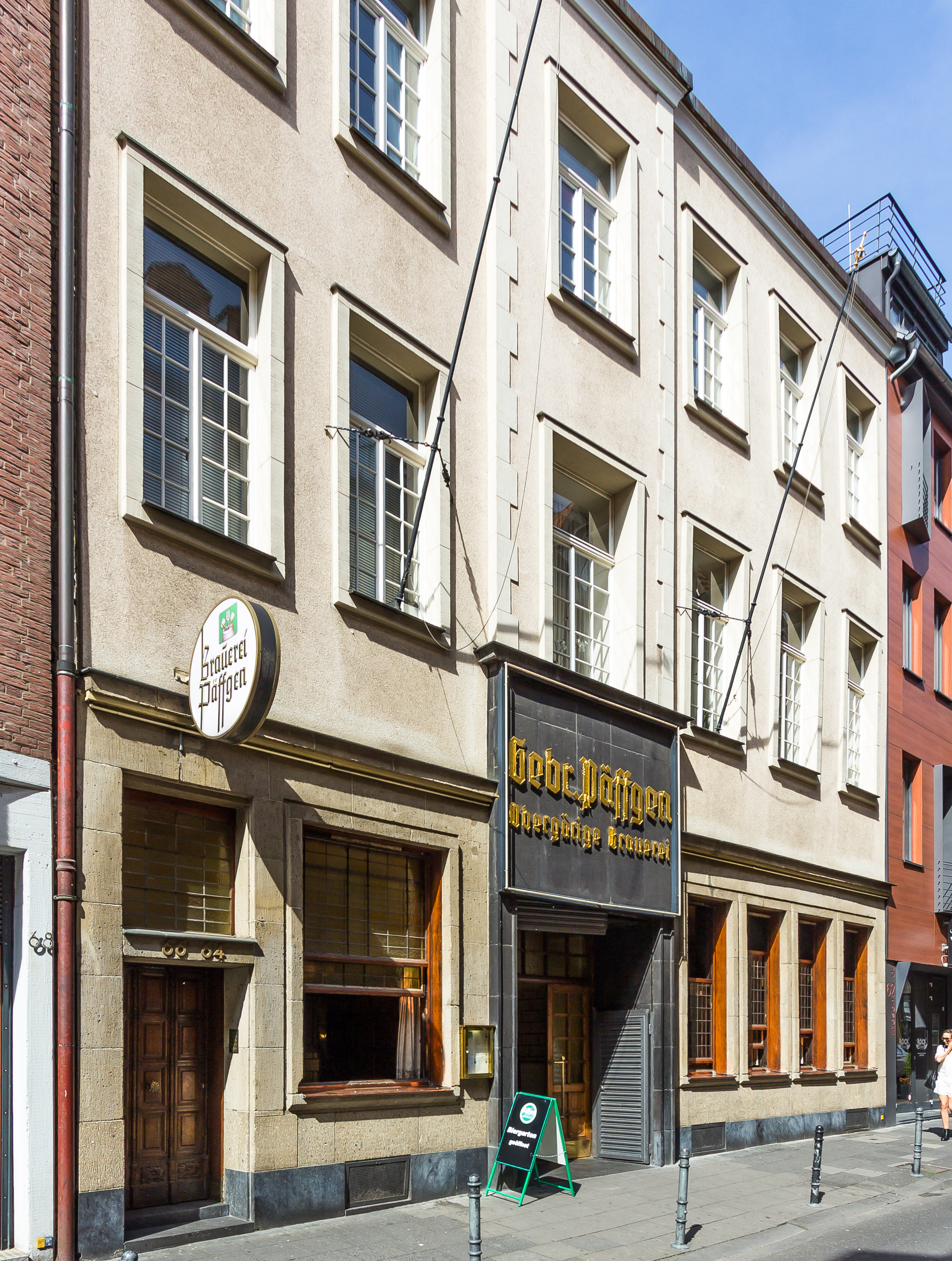 Päffgen Brauhaus, Friesenstraße 64-66, Köln